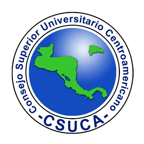 Logo CSUCA